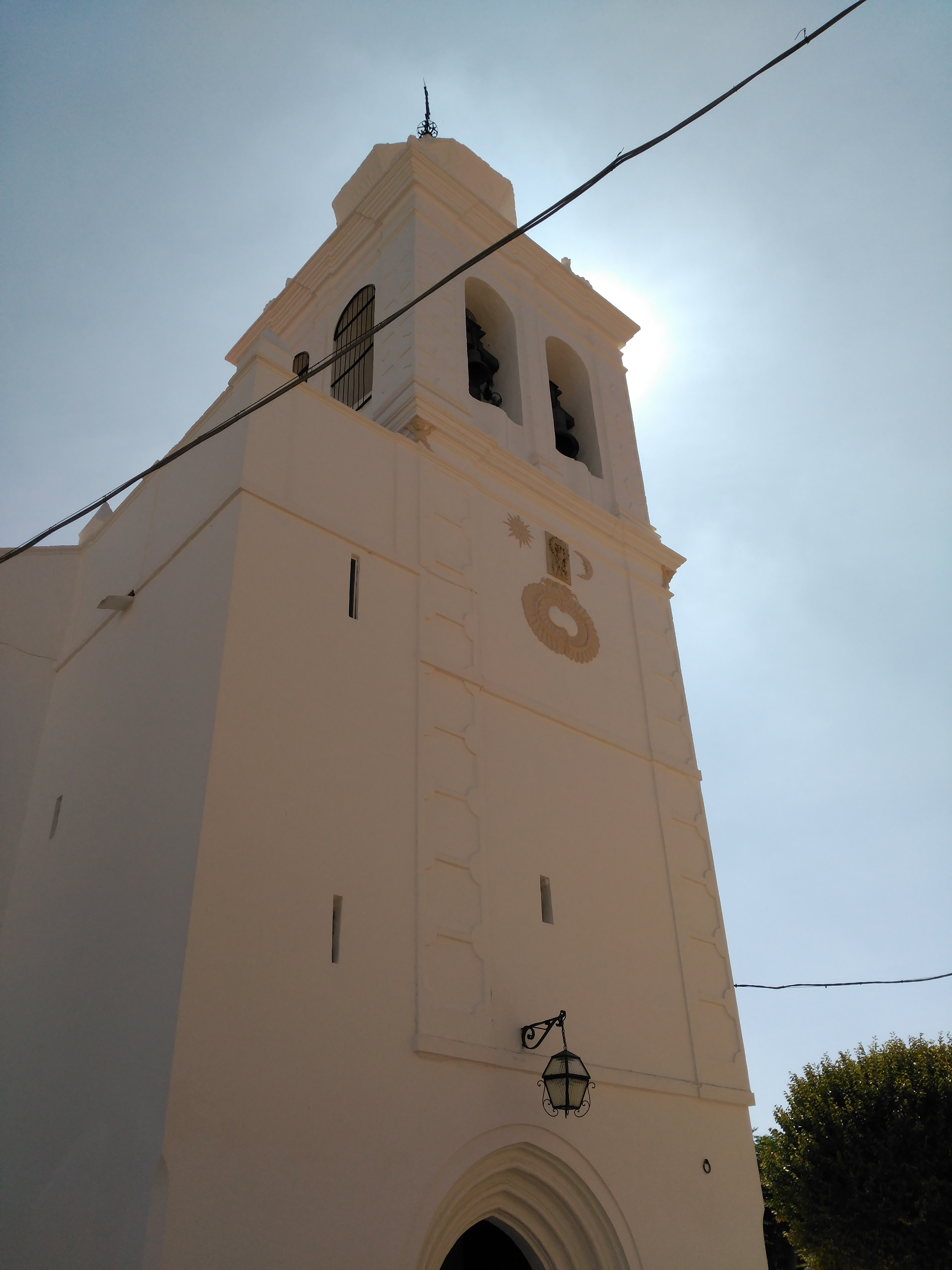 Torre Coronada Villafranca